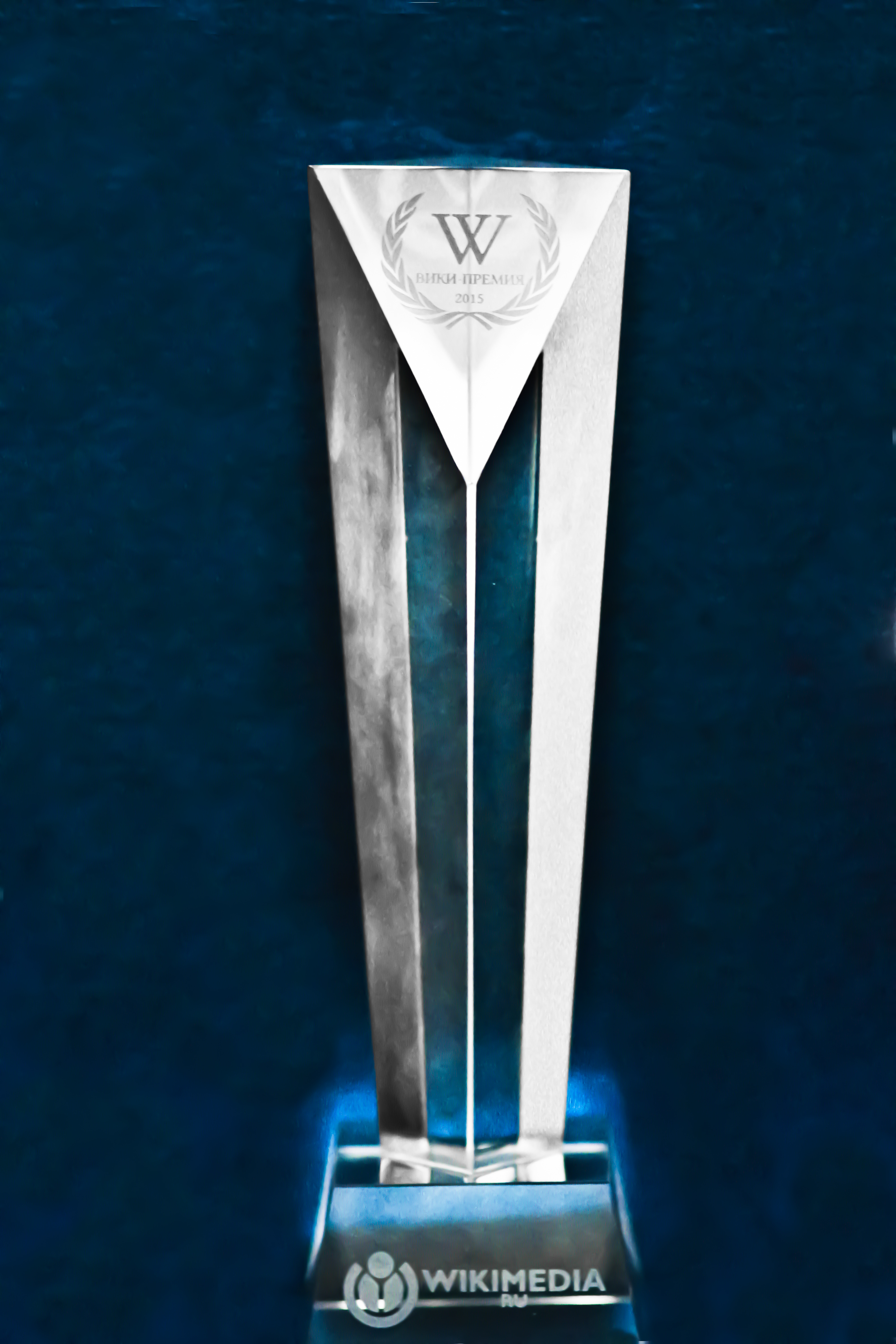 Статуэтка Вики-премии 2015